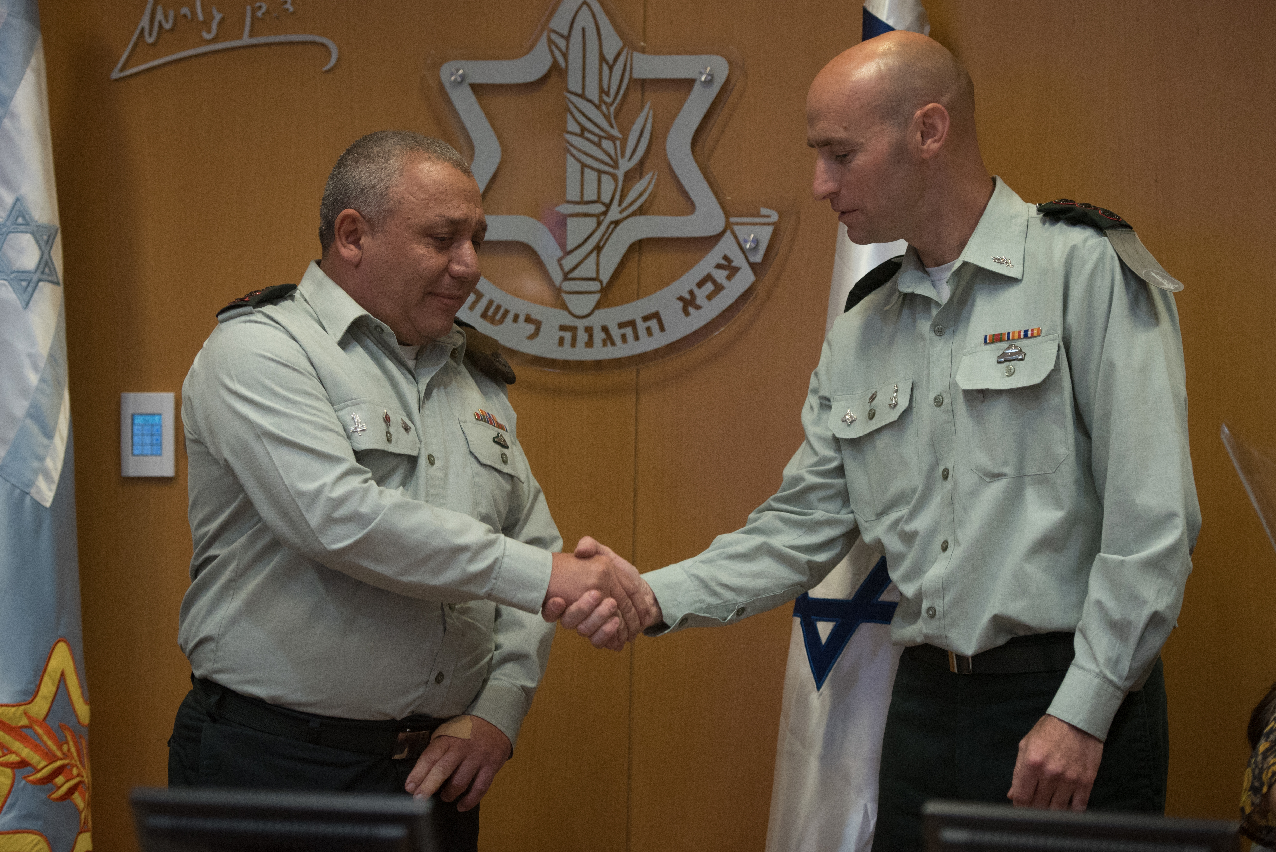 דרגת אל״מ